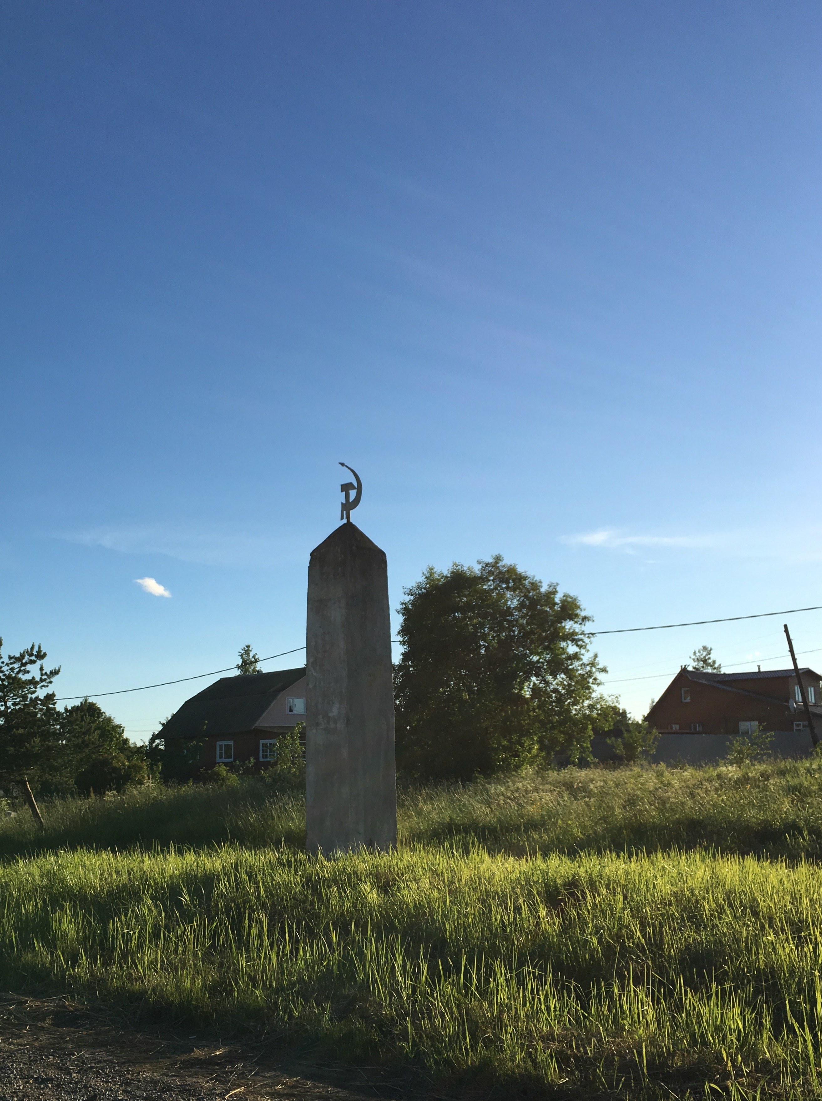 Петровское